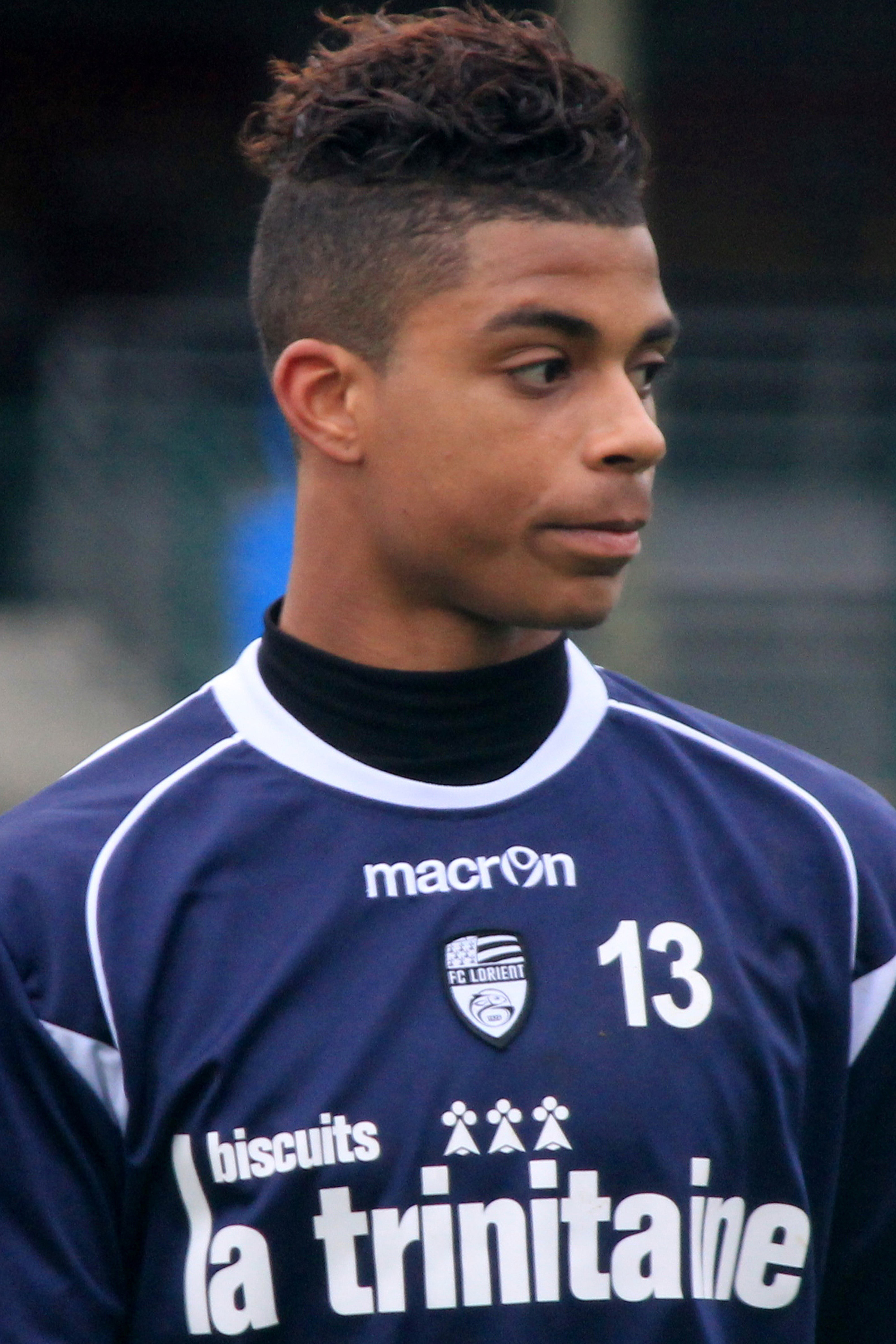 Mario Lemina pendant un entrainement du FC Lorient le 3 janvier 2012